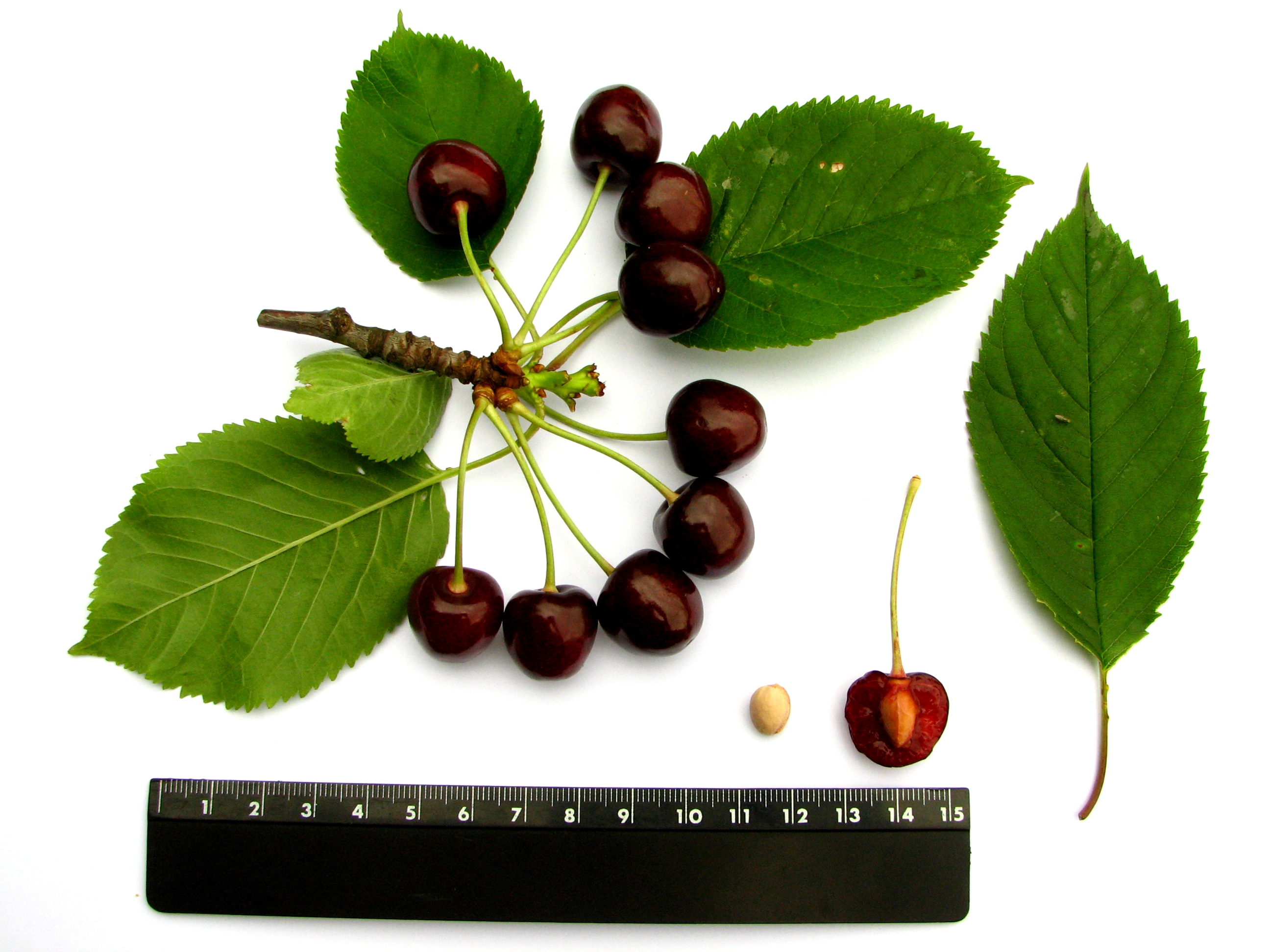 Maguskirss 'Ene'